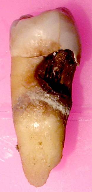 Cervical decay on premolar